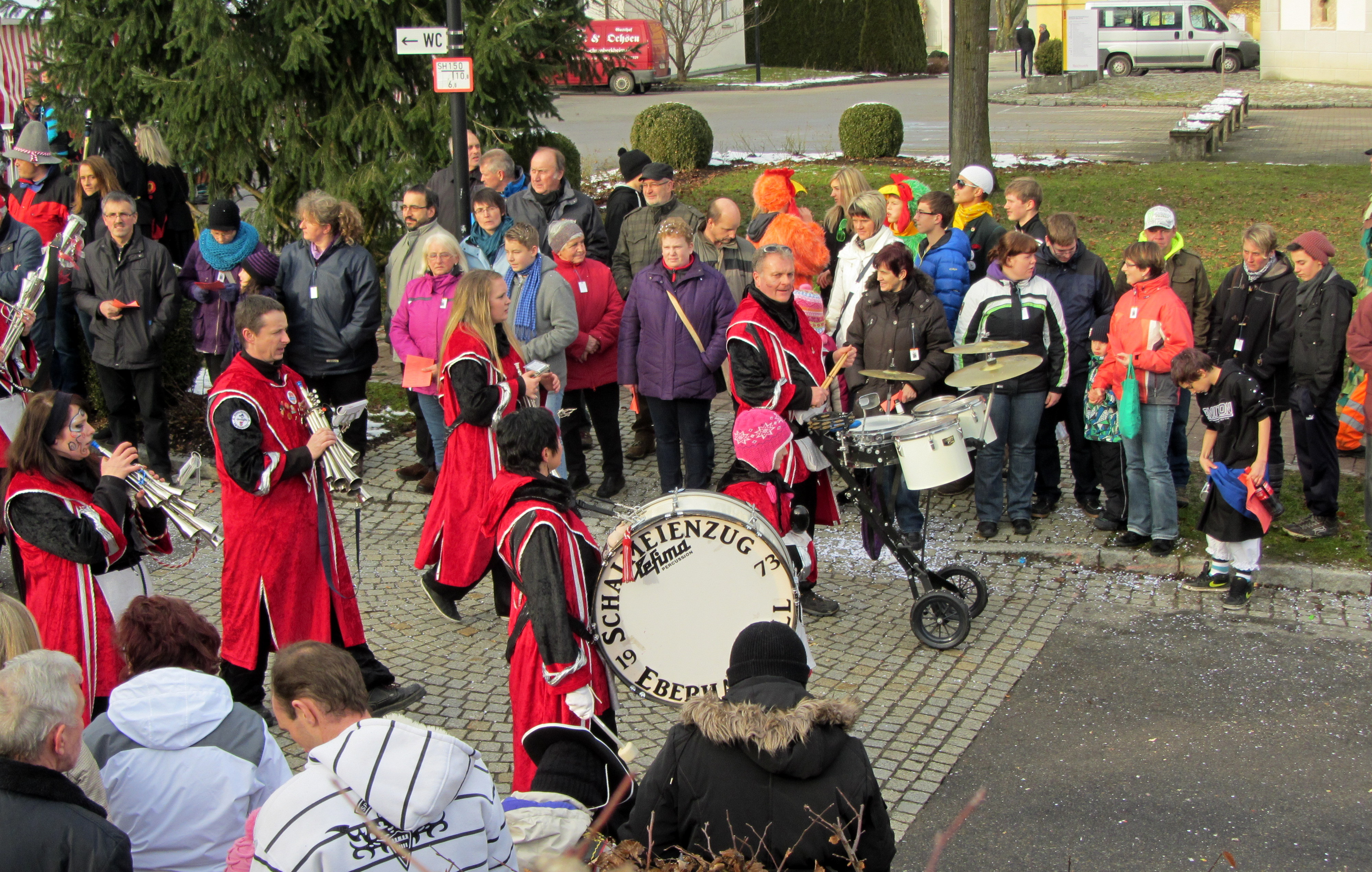 Narrenumzug Rot an der Rot (2013)- Schalmeien Eberhardzell